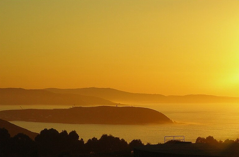 Punta Langosteira dende O Monte de San Pedro, Visma, A Coruña, Galicia (Spain) Punta Langosteira en el 2007 desde el monte San Pedro antes de asomar el dique del nuevo puerto que estan construyendo y que tendra una longitud de 3,5 Km en mar abierto.